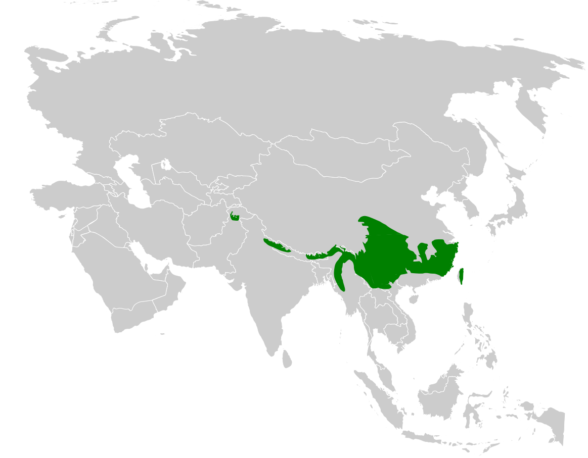 Horornis fortipes distribution map, based on